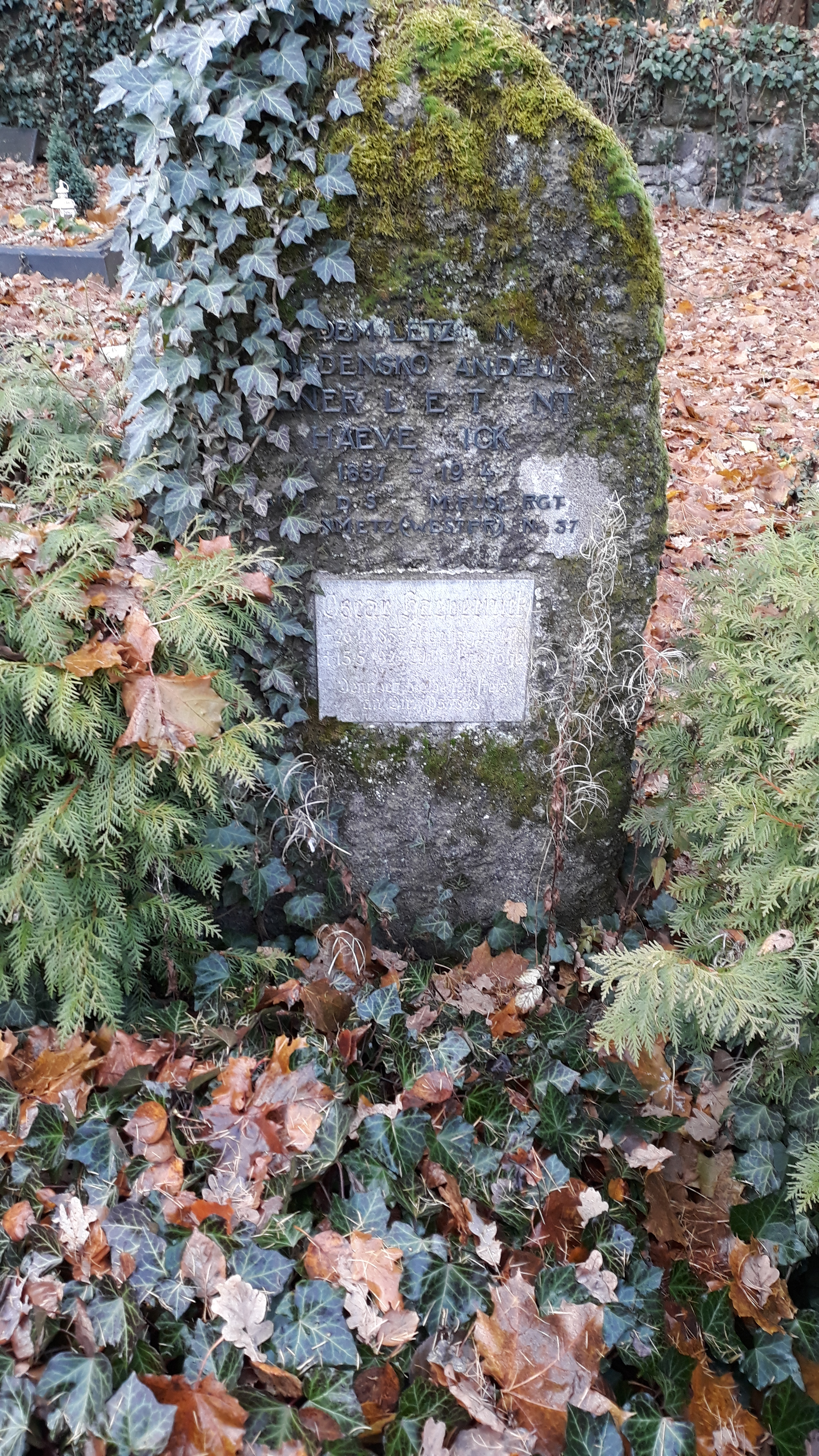 Das Grab des deutschen Offiziers Oskar Haevernick auf dem Friedhof Mulang in Kassel.